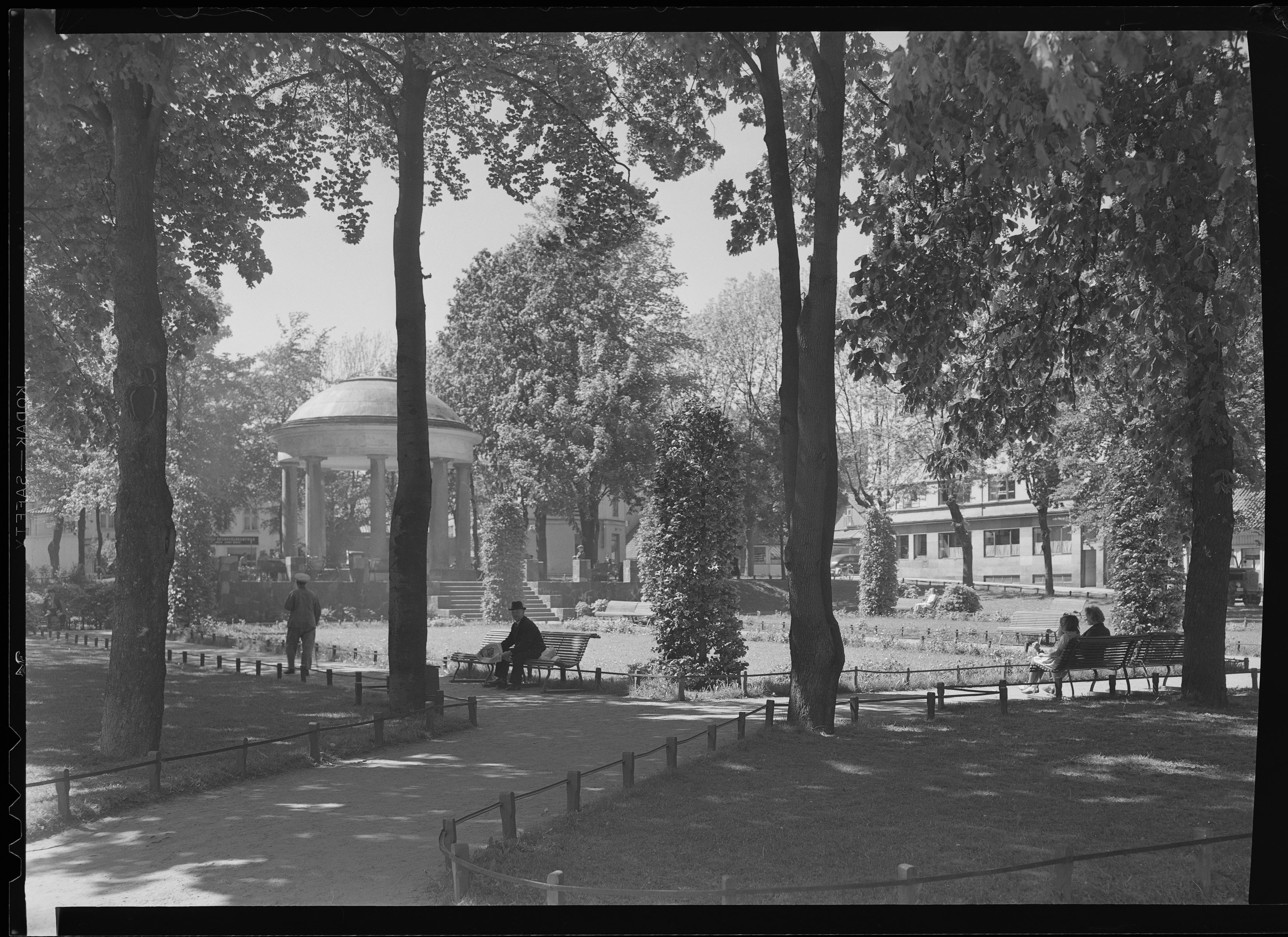 Bildet er hentet fra Nasjonalbibliotekets bildesamling. Anmerkninger til bildet var: Fotograf : ukjent Tønsberg, Tønsberg, Vestfold